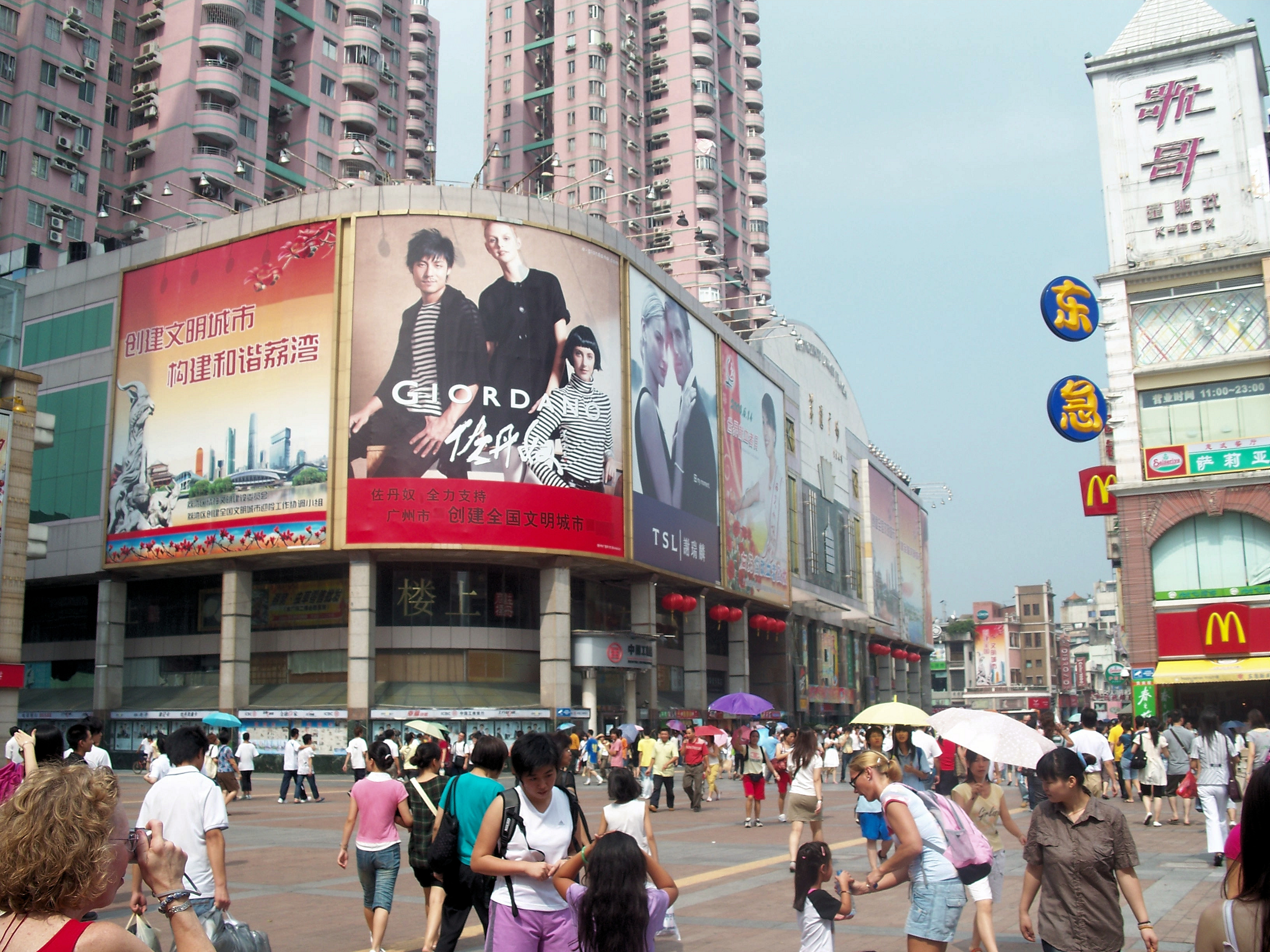 粵語: 上下九荔灣廣場